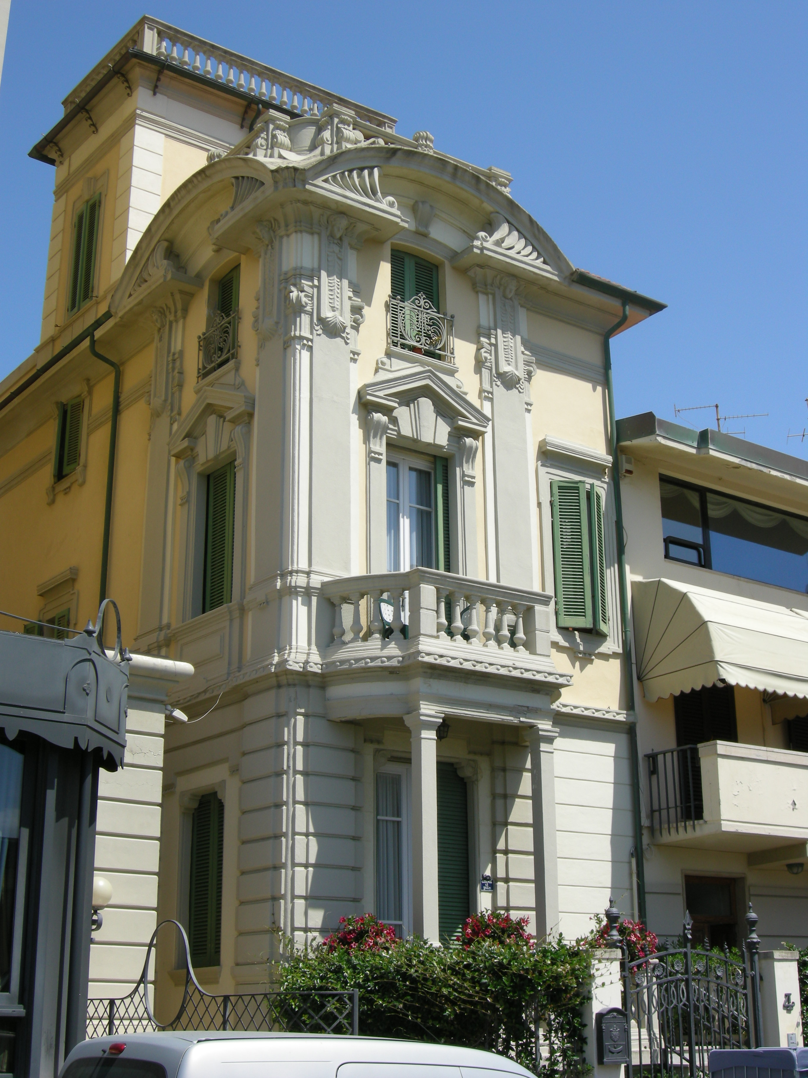 Viareggio, palazzina liberty